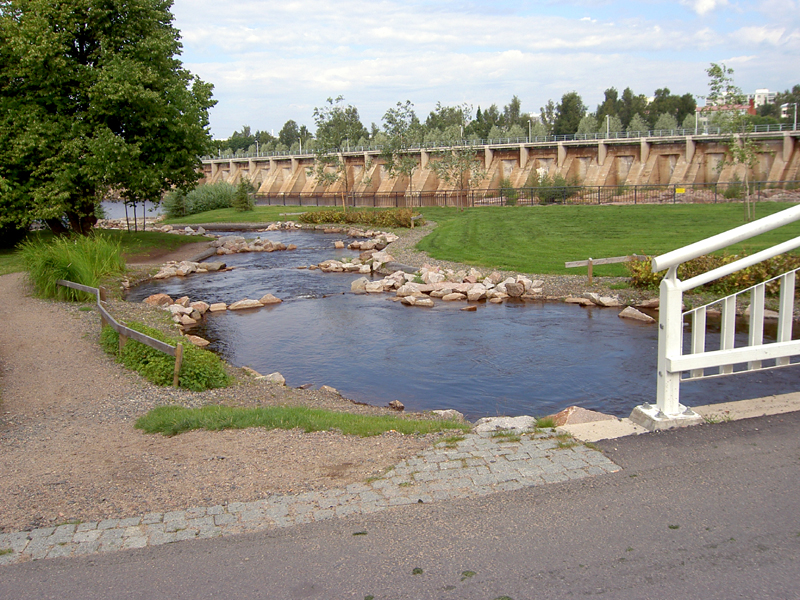 Hupisaaret, Oulu, Finland